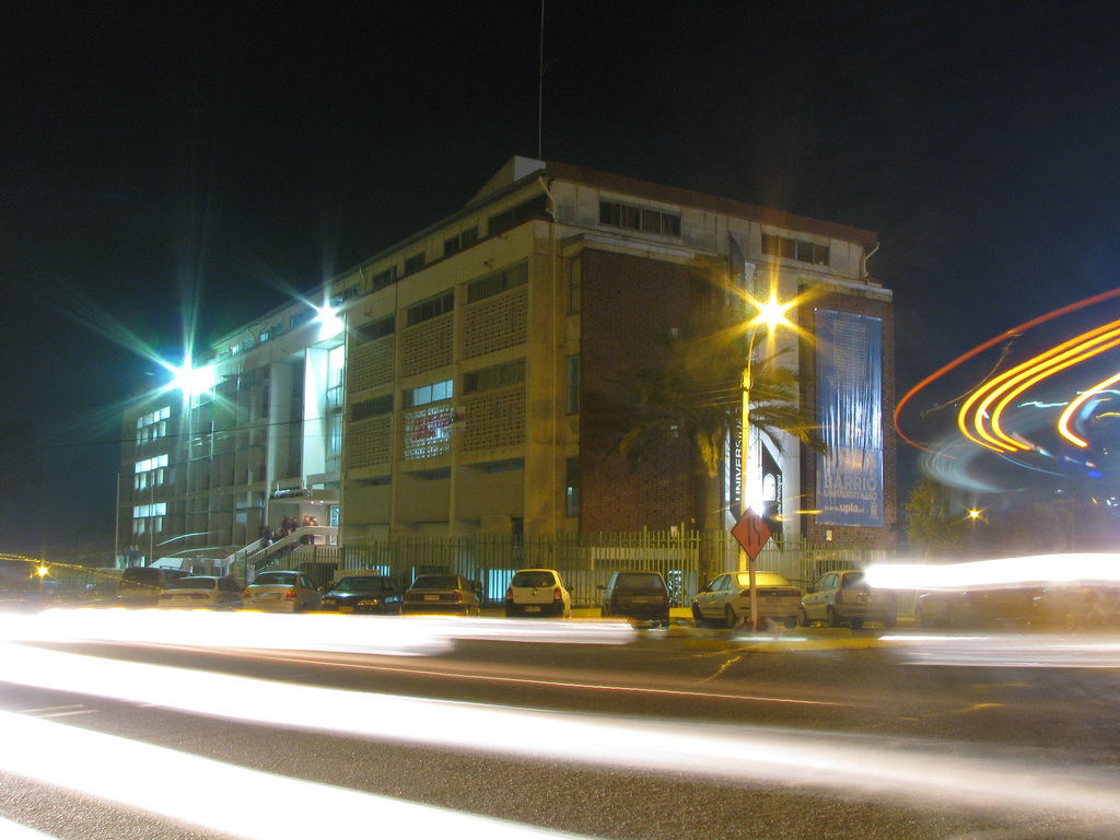 Casa Central de la Universidad de Playa Ancha.